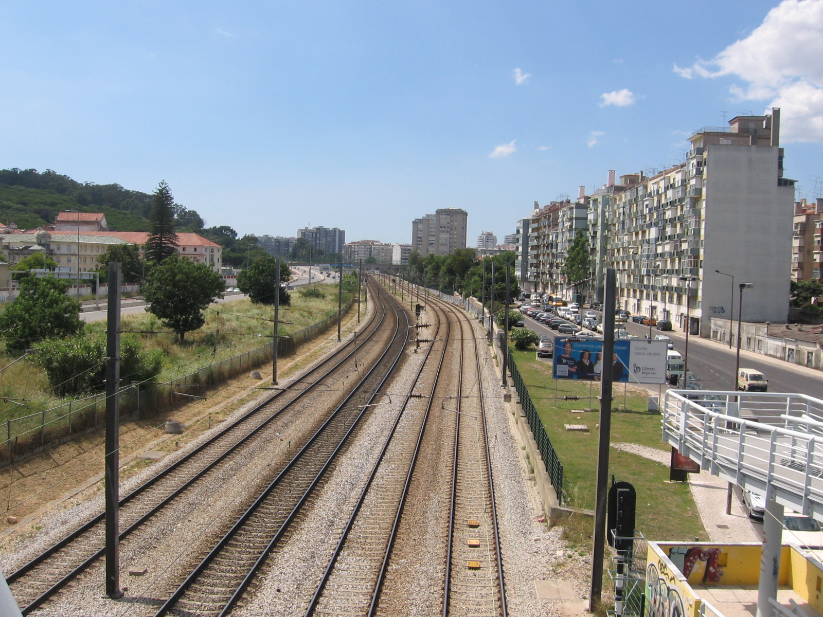 Linha de Sintra, local do antigo apeadeiro da Cruz da Pedra, São Domingos de Benfica, Lisboa, Portugal